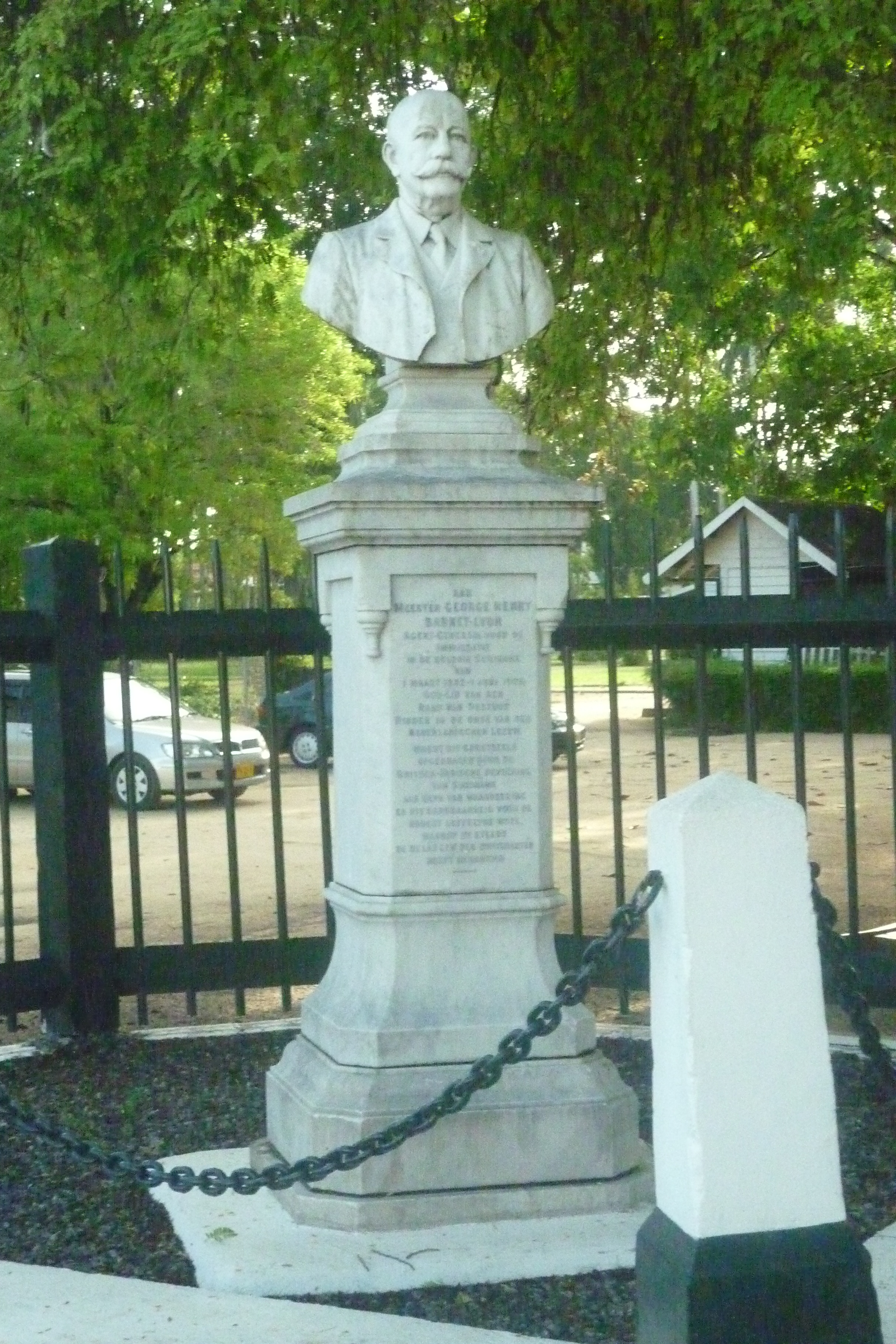 Standbeeld in Paramaribo van George Henry Barnet-Lyon